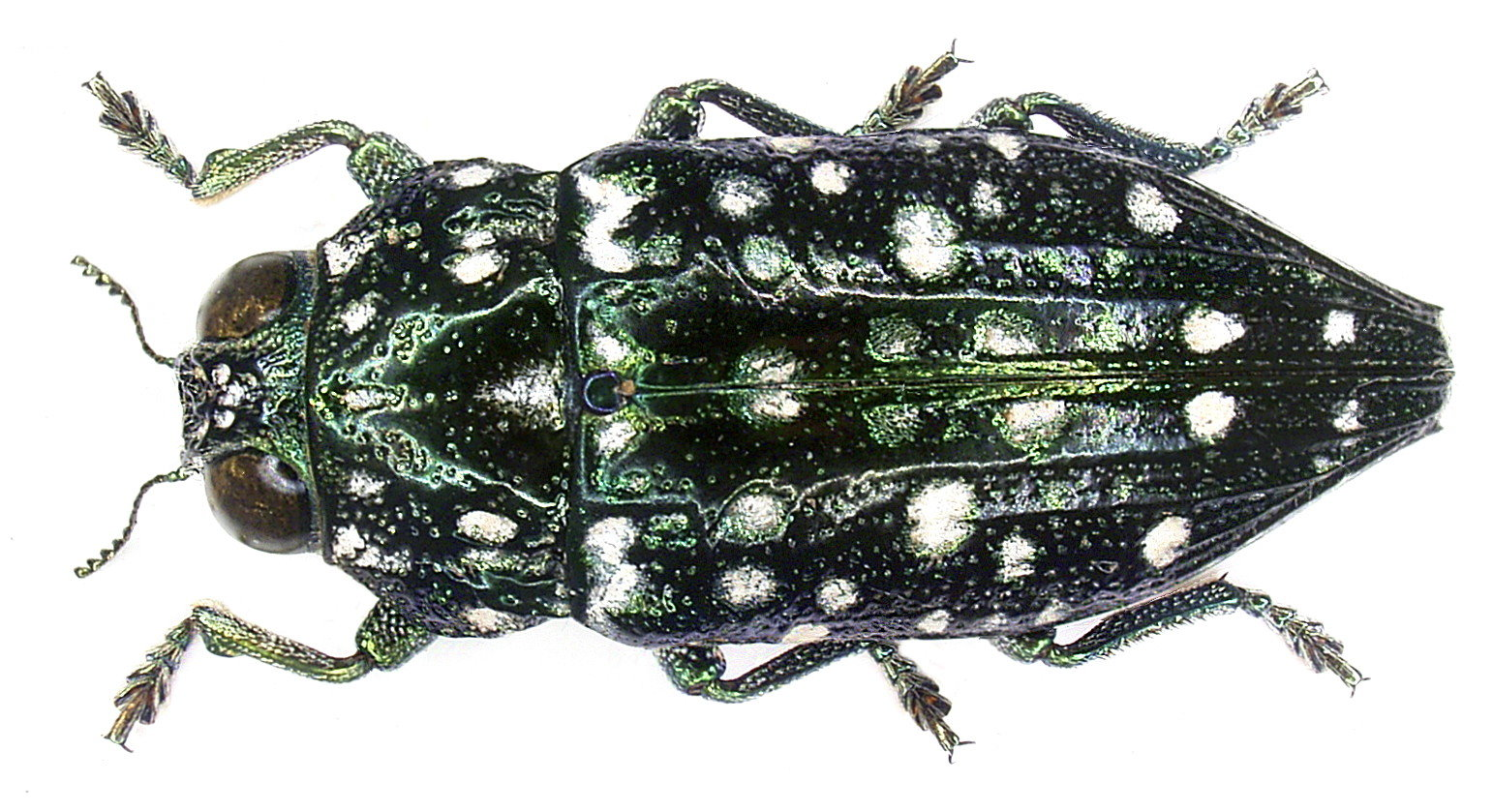 Familie: Buprestidae Grösse: 20-22 mm Fundort: Indonesien, Batanta Isl., Yensawa leg. A.Skale, 2004; det. Niehuis Foto: U.Schmidt, 2006